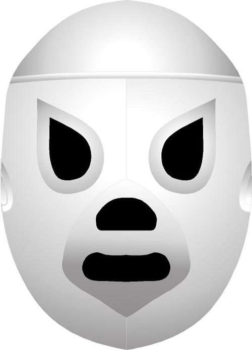 Representación grafica de la Mascara de El Santo. Imagen vectorial trazada por usuario LeCire (convertida a imagen JPG para su uso en Wikipedia). Depiction of El Santo Mask. Vector image traced by user LeCire (converted to JPG image for display on Wikipedia).